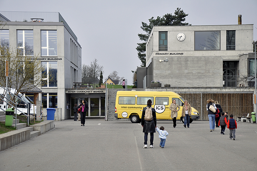 Die Inter-Community School in Zumikon